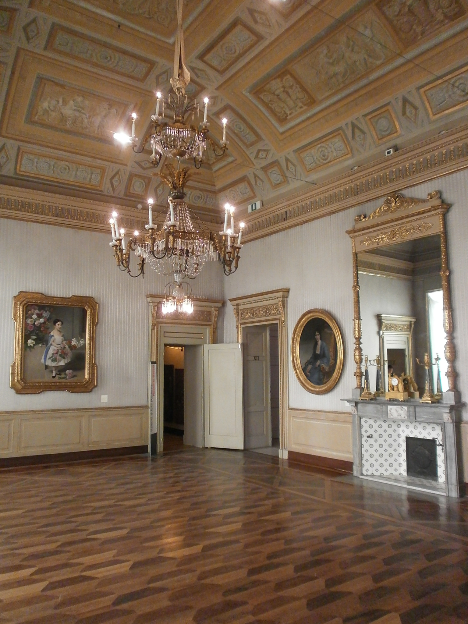 Villa reale belgiojoso - Milano - Sullo sfondo Ritratto della contessina Antonietta Negroni Prati Morosini, Francesco Hayez, 1858.